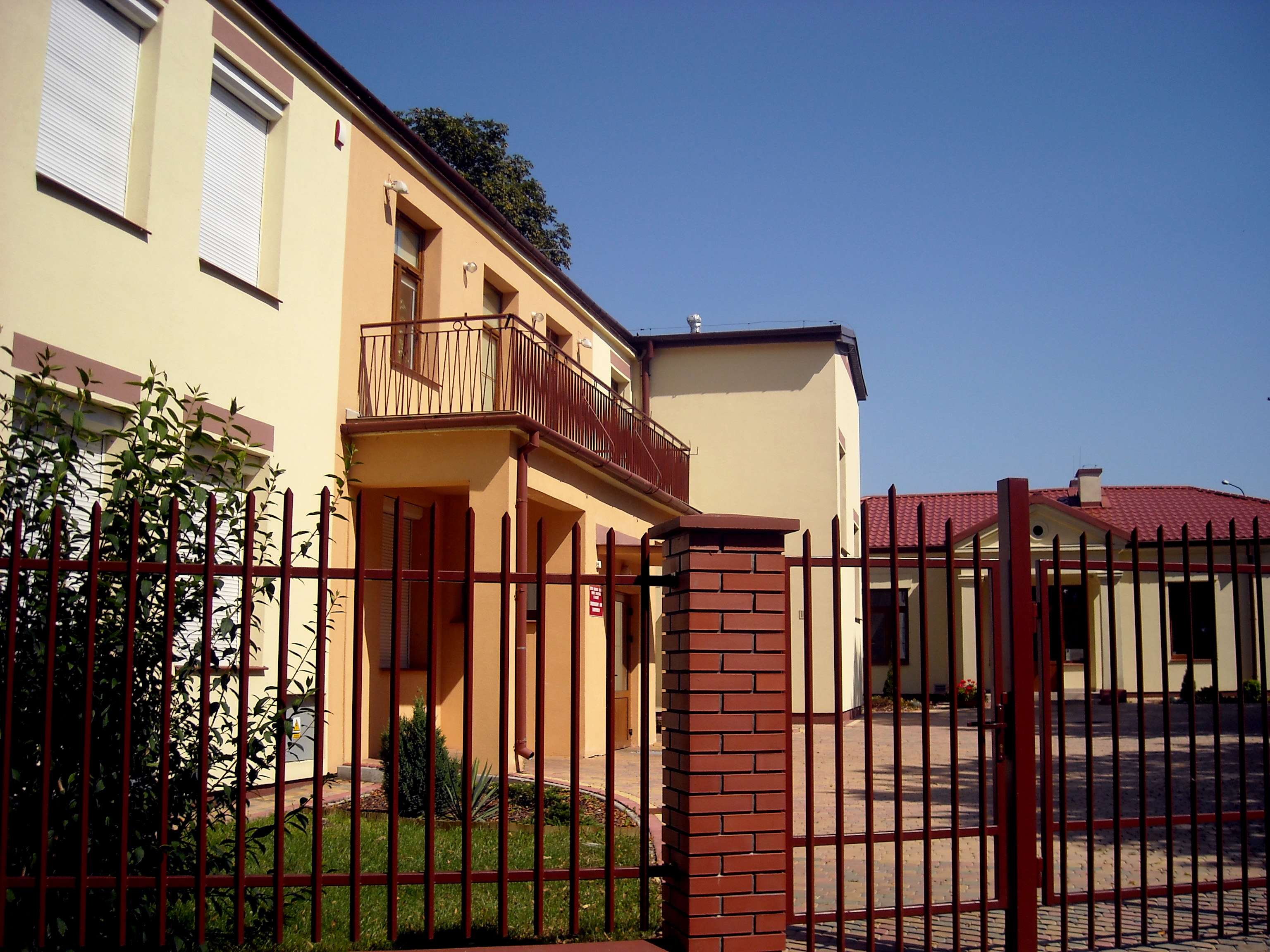 Środowiskowy Dom Samopomocy (w budynku dawnej Szkoły Podstawowej nr 3) przy ul. Nałkowskich w lubelskiej dzielnicy Wrotków